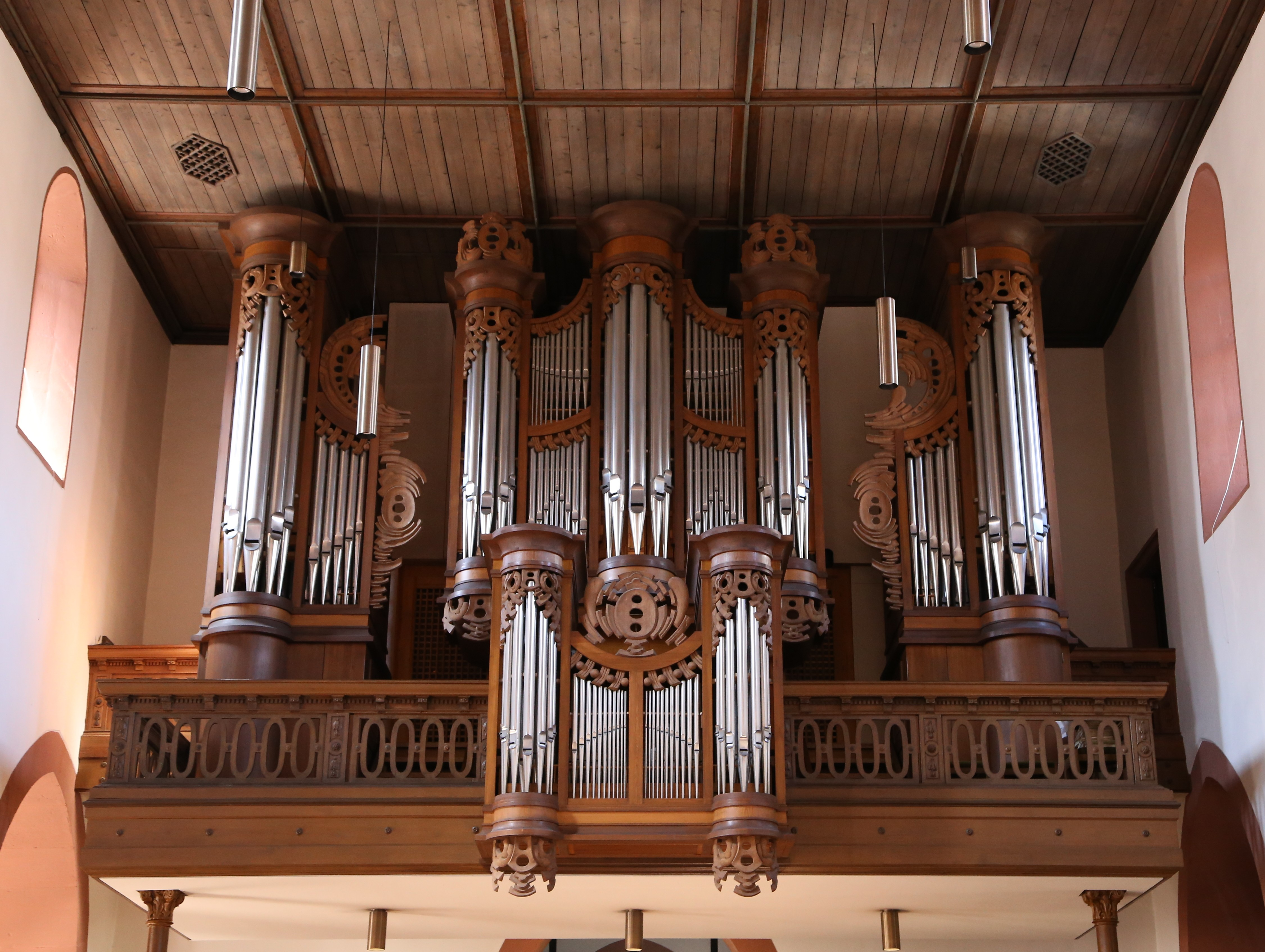 Kirchplatz 2, Lohr am Main; Katholische Stadtpfarrkirche Sankt Michael, Sakristei 12. Jahrhundert, Langhaus 13. Jahrhundert, Chor und Turm zweite Hälfte 15. Jahrhundert, mit Ausstattung.